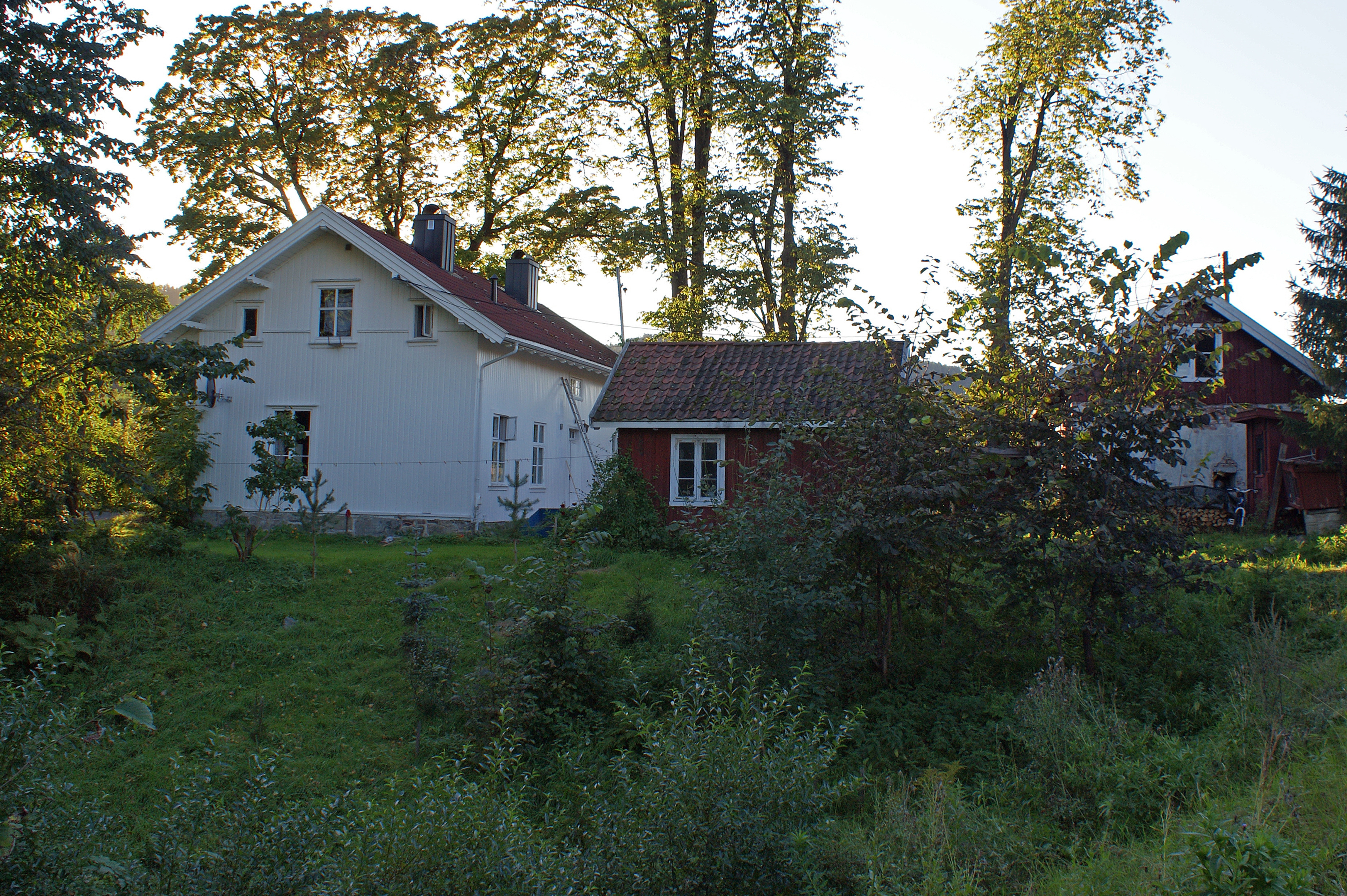 Økri skole var en av de første faste skolene i Bærum. Innviet 1866. Nedlagt 1901 da Skui skole stod klar. Bildet er tatt i 2011